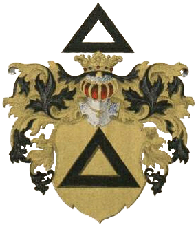 Schulmanni suguvõsa aadlivapp